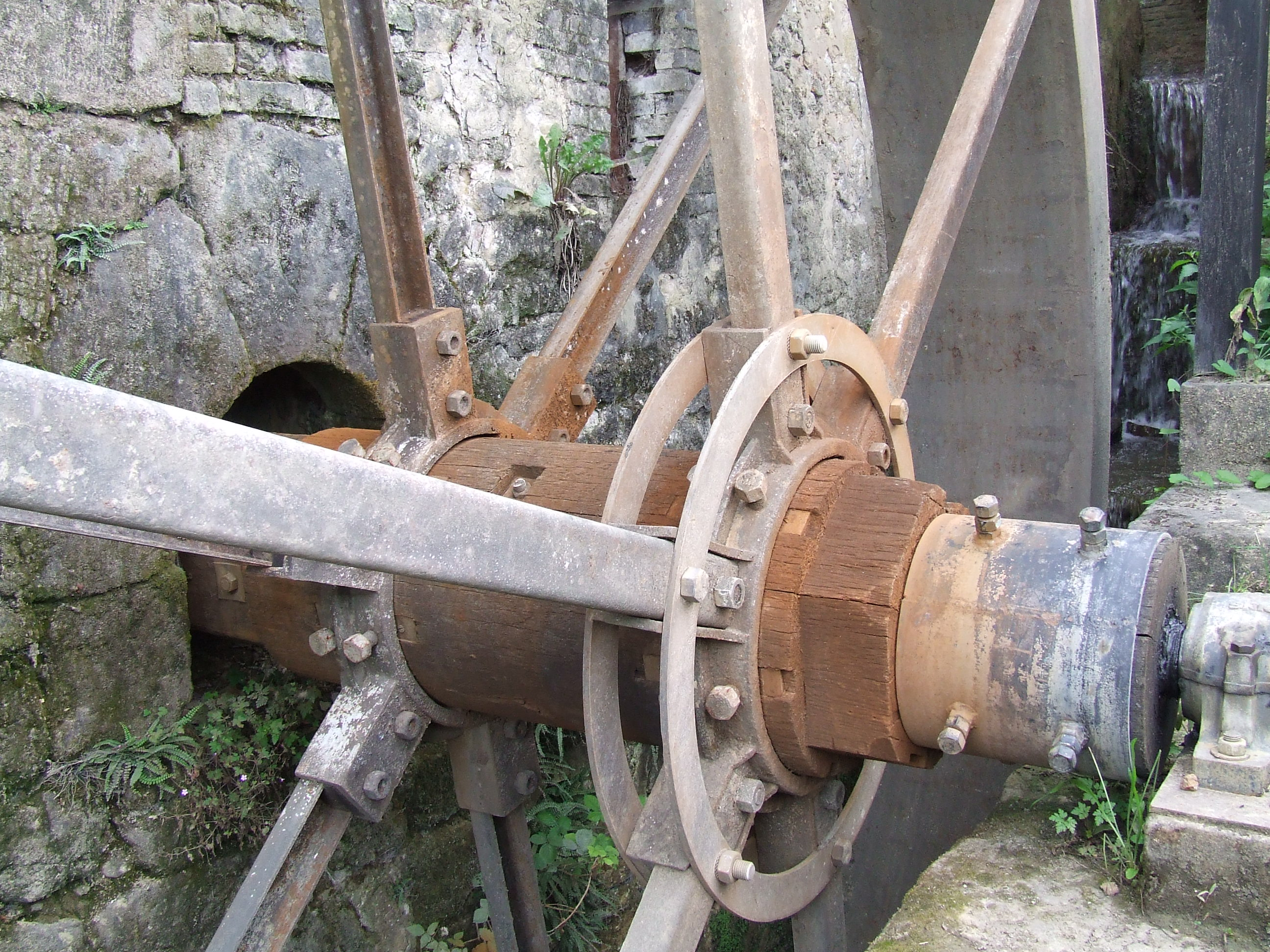 Axe de roue restauré.